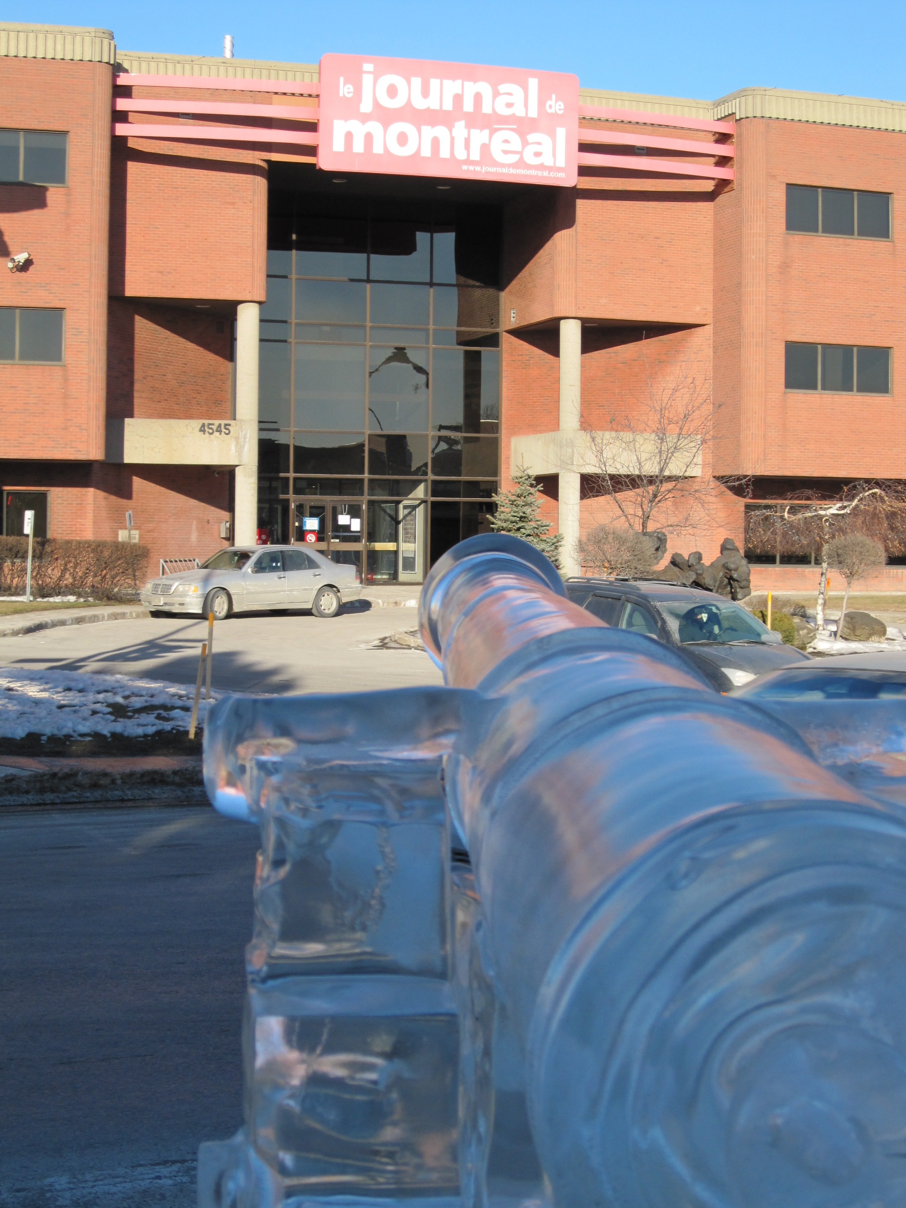 . Canon de glace en face du Journal de Montréal.